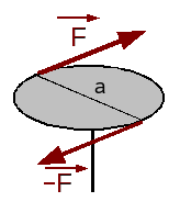 Koppel van krachten